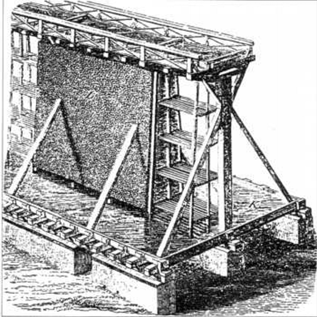 Gradierwerk, Konstruktionszeichnung Ende 18. Jhdt.